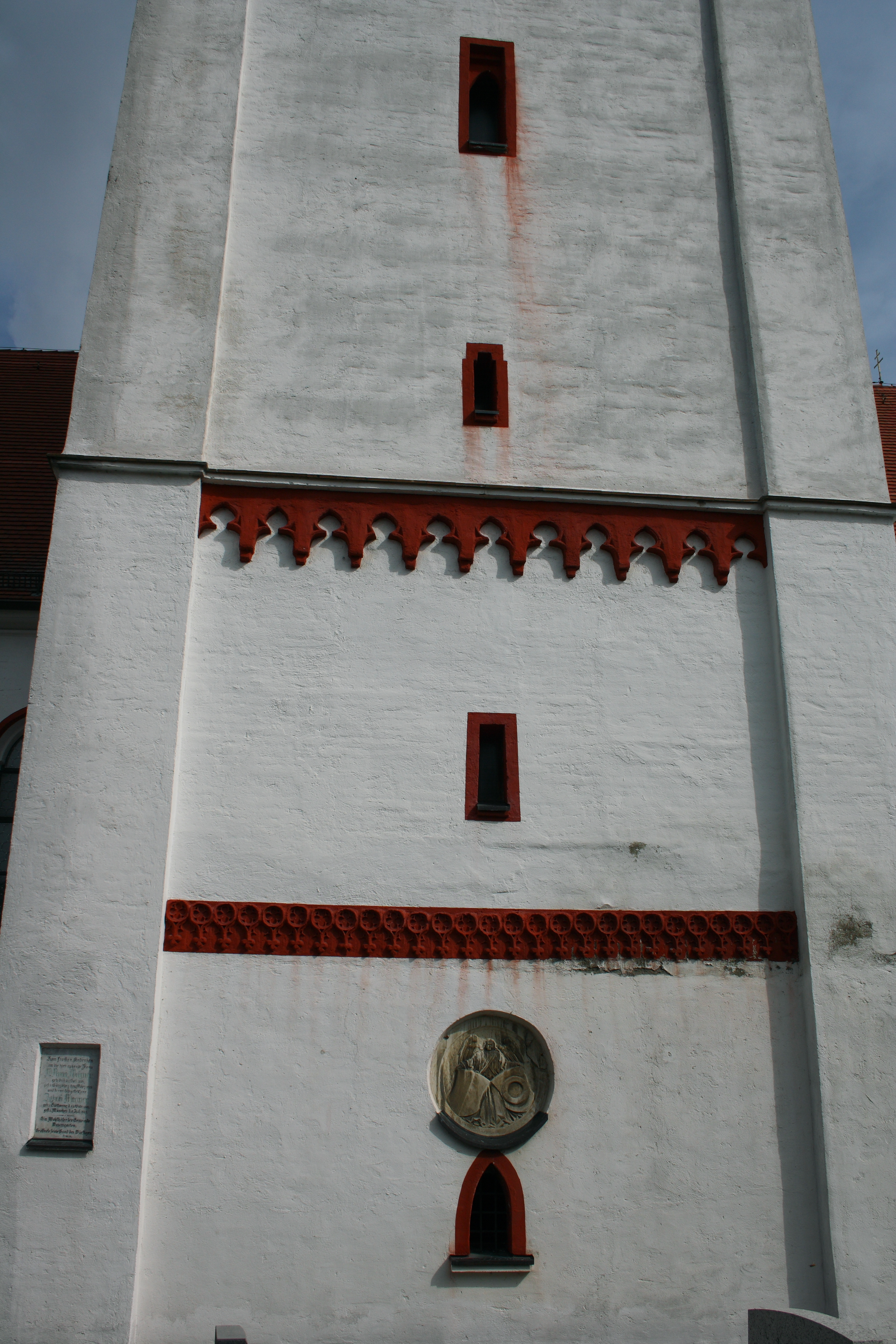 Katholische Pfarrkirche St. Georg in Aislingen im Landkreis Dillingen an der Donau (Bayern), Ansicht von Südwesten, Satteldachturm, Maßwerkrelieffriese (Drei- und Vierpass) über dem ersten Geschoss, genaste Spitzbogenfriese aus Formsteinen über dem zweiten Geschoss